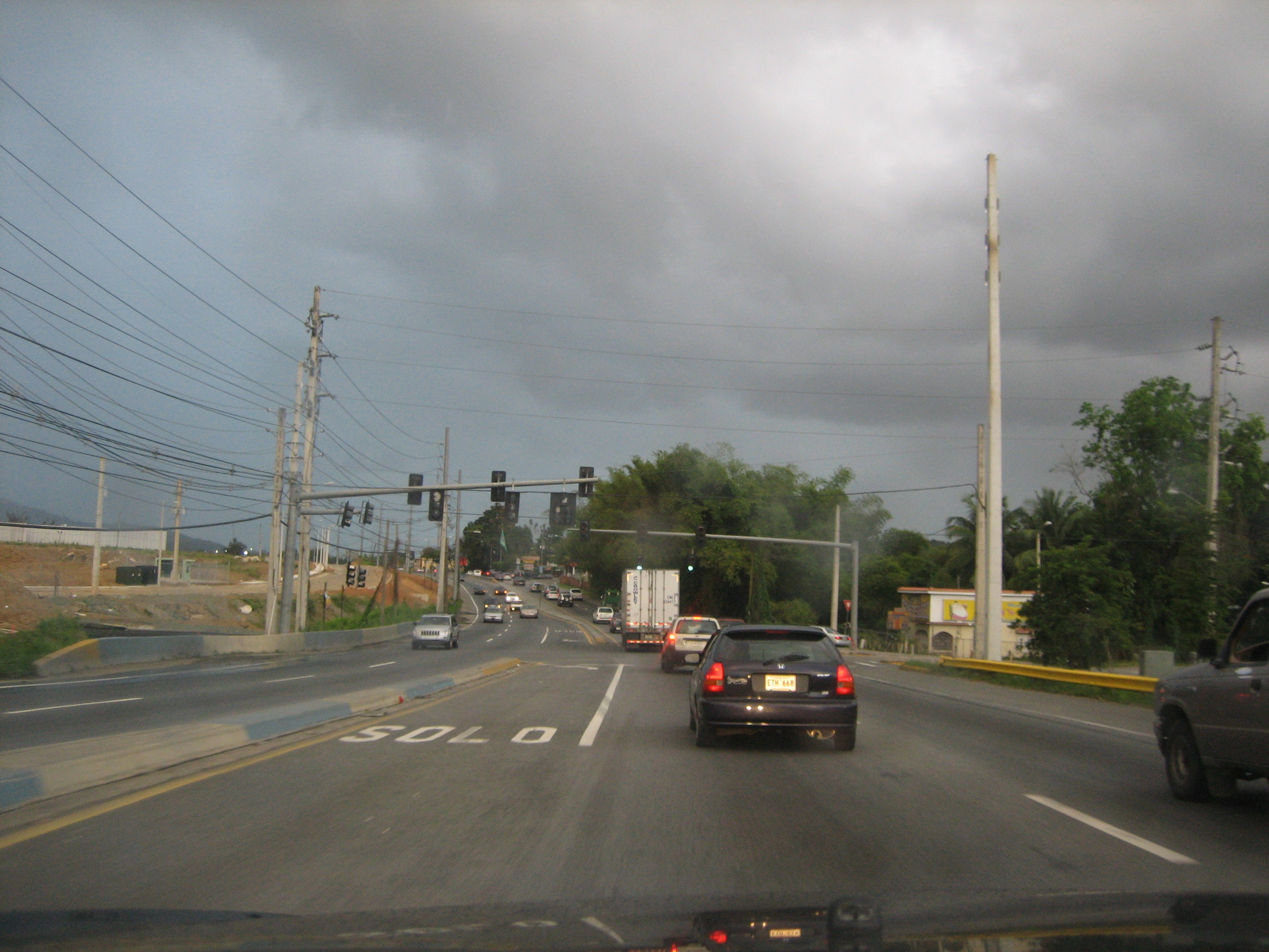 Carretera 1